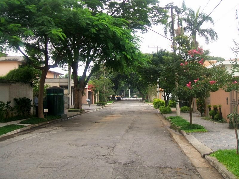 Rua no bairro do Butantã, cidade de São Paulo, Brasil.